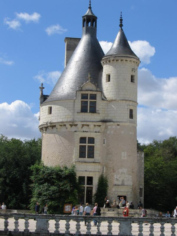 Chateau de Chenonceau, Tour des Marques